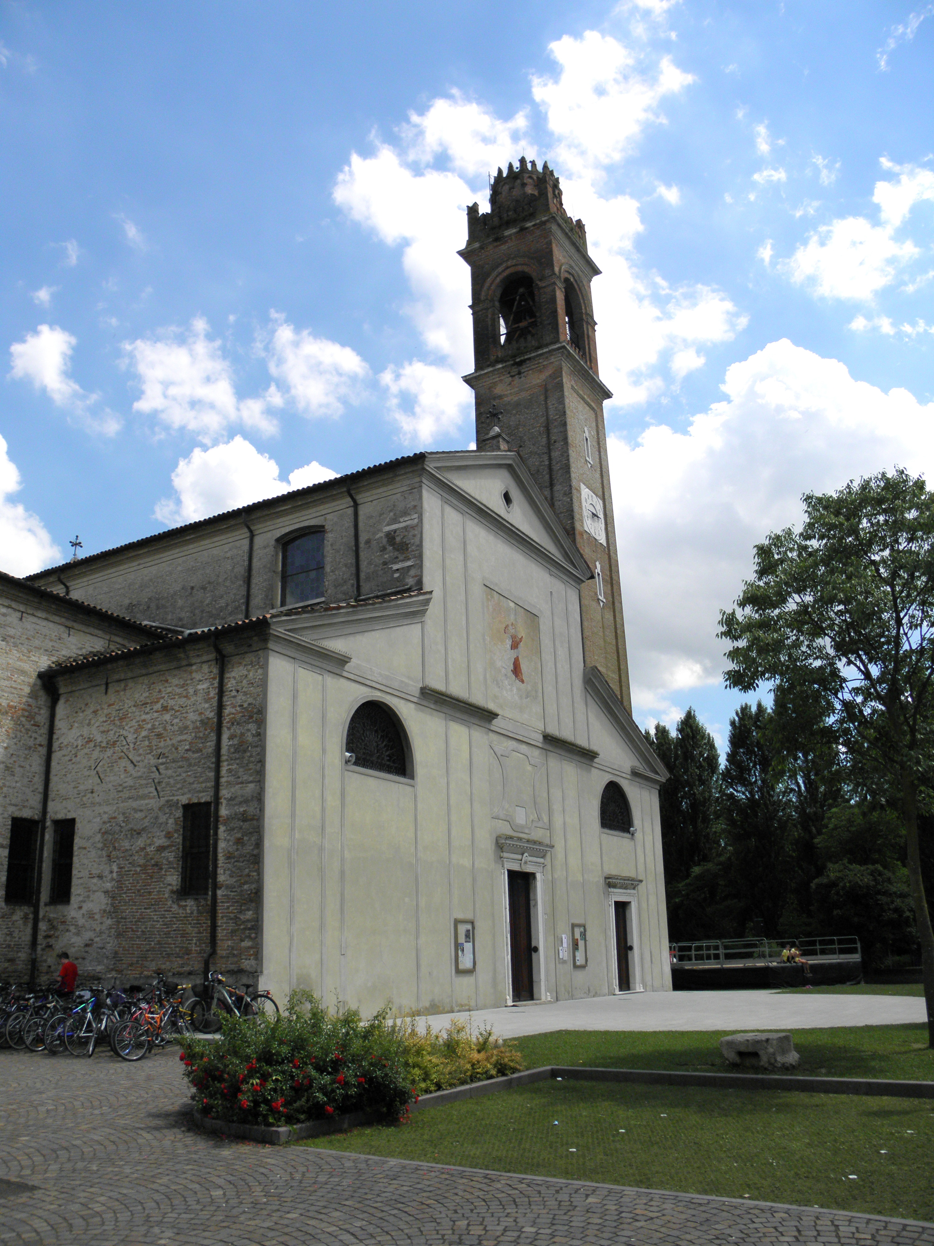 Casale sul Sile, chiesa parrocchiale di Santa Maria Assunta.